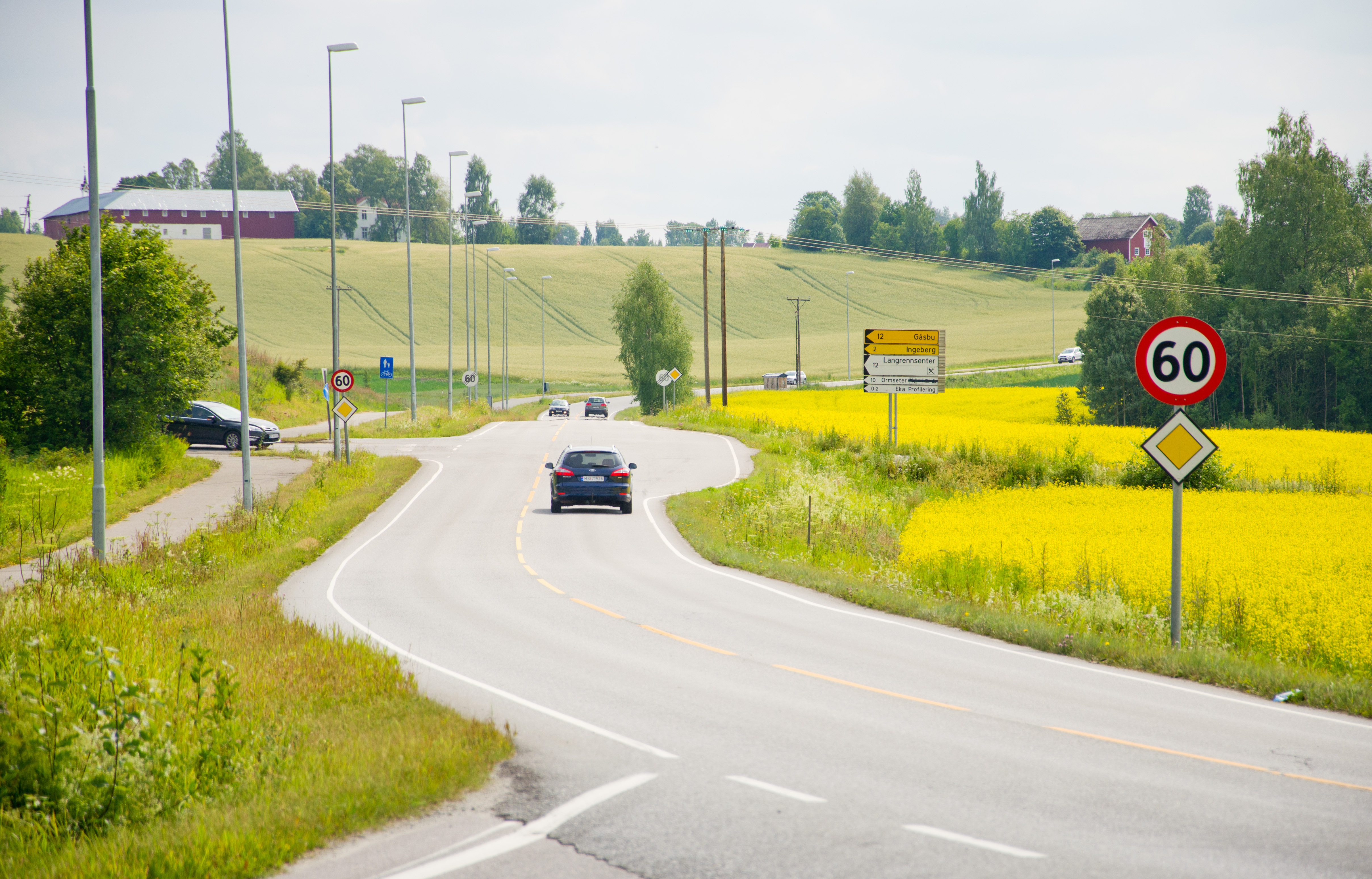 Fylkesvei 224 (tidl. 116) Sælidvegen, avkjøring til fylkesvei 1796